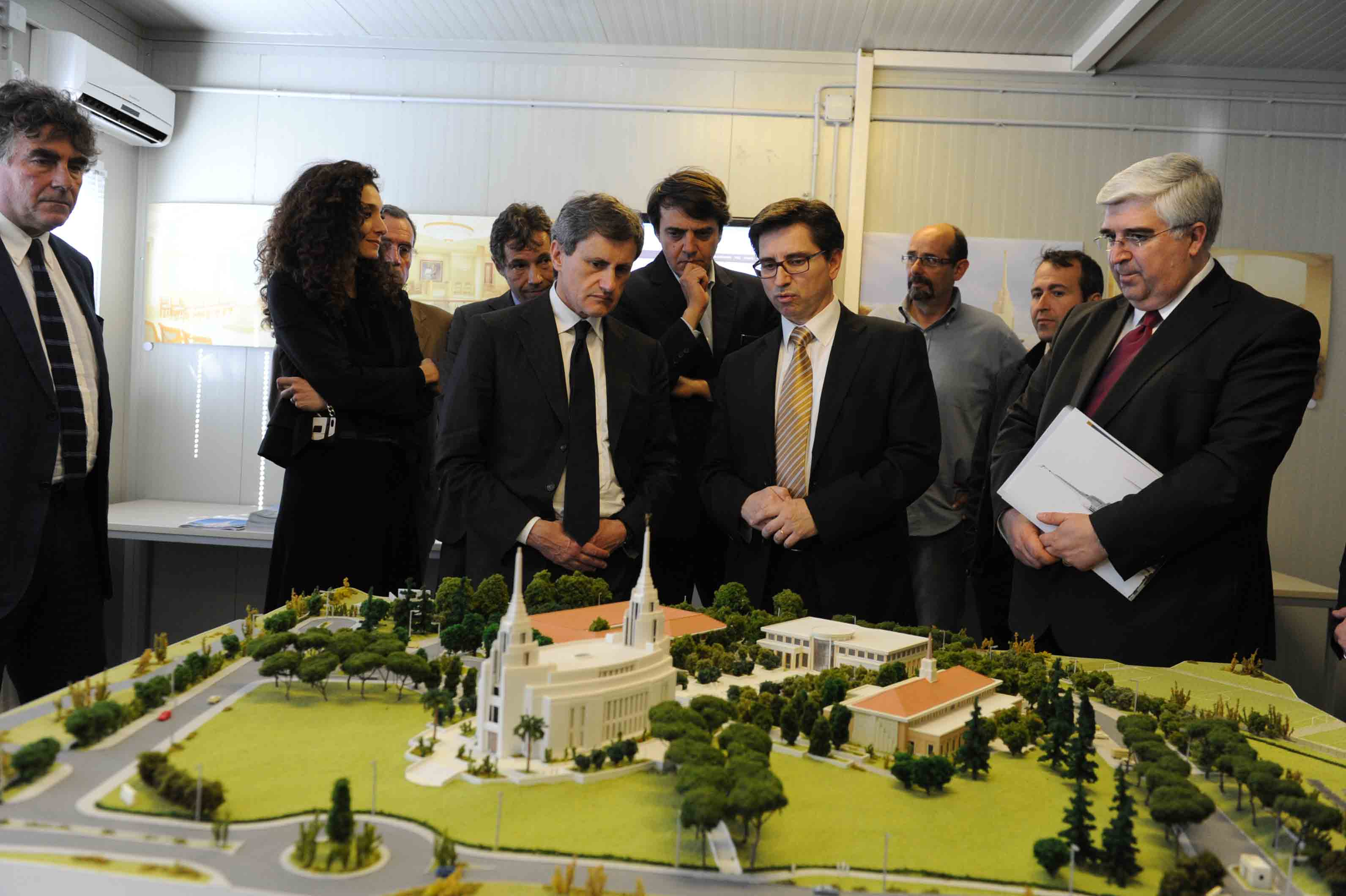 Foto di C. Valletti